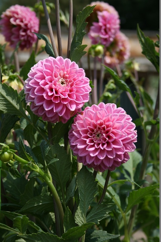 le dalie del Parco